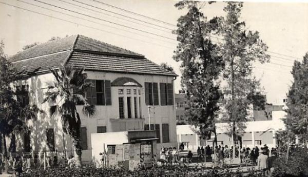 בית ספר נצ"ח בנות ברחוב מוהליבר